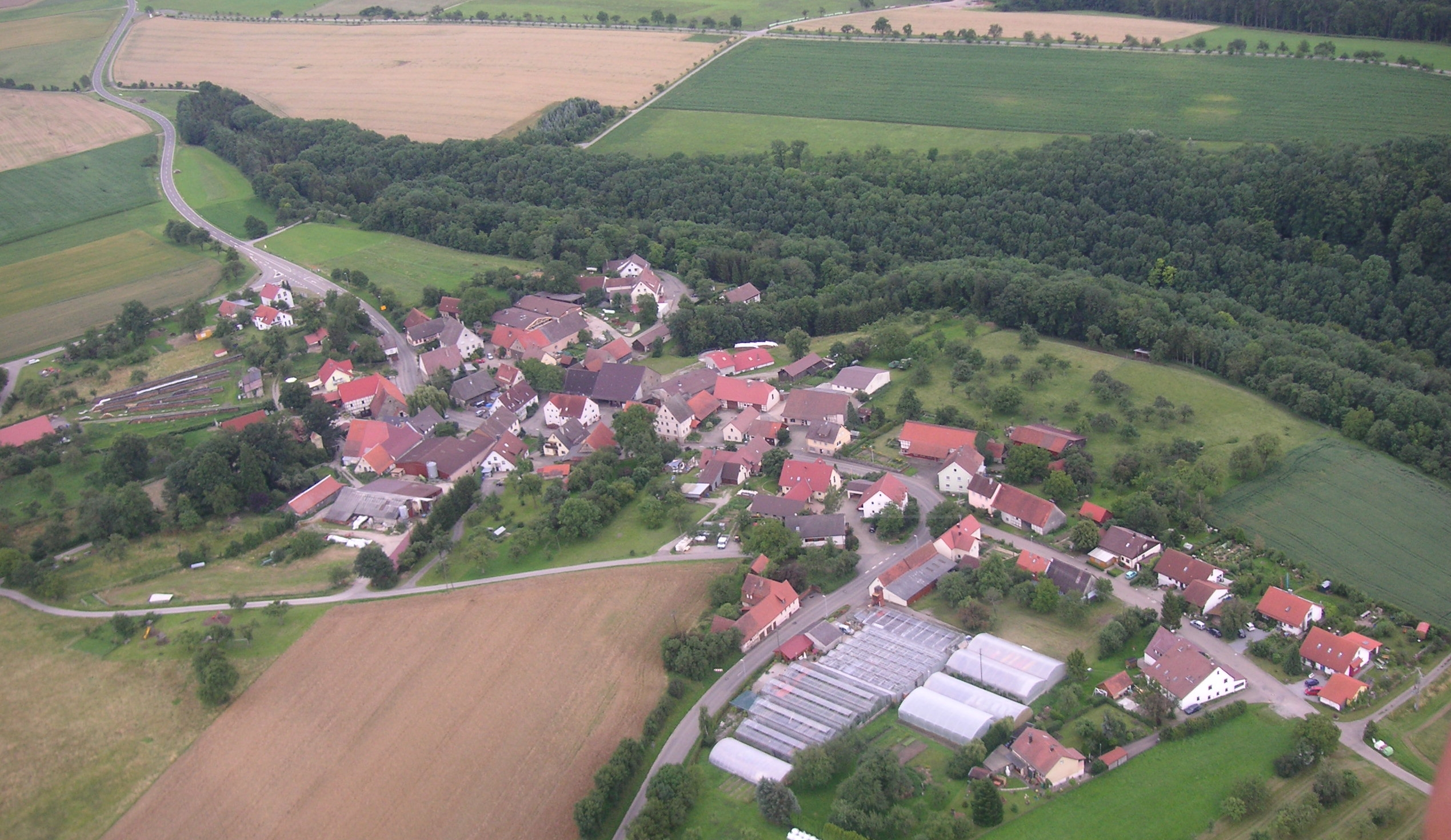 Luftbild von Mäusdorf (Kreis Künzelsau)